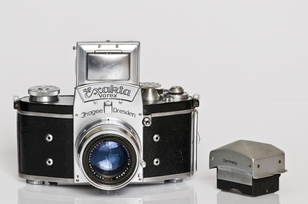 Ihagee Exakta Varex Baujahr 1950 mit nicht originalem Prisma